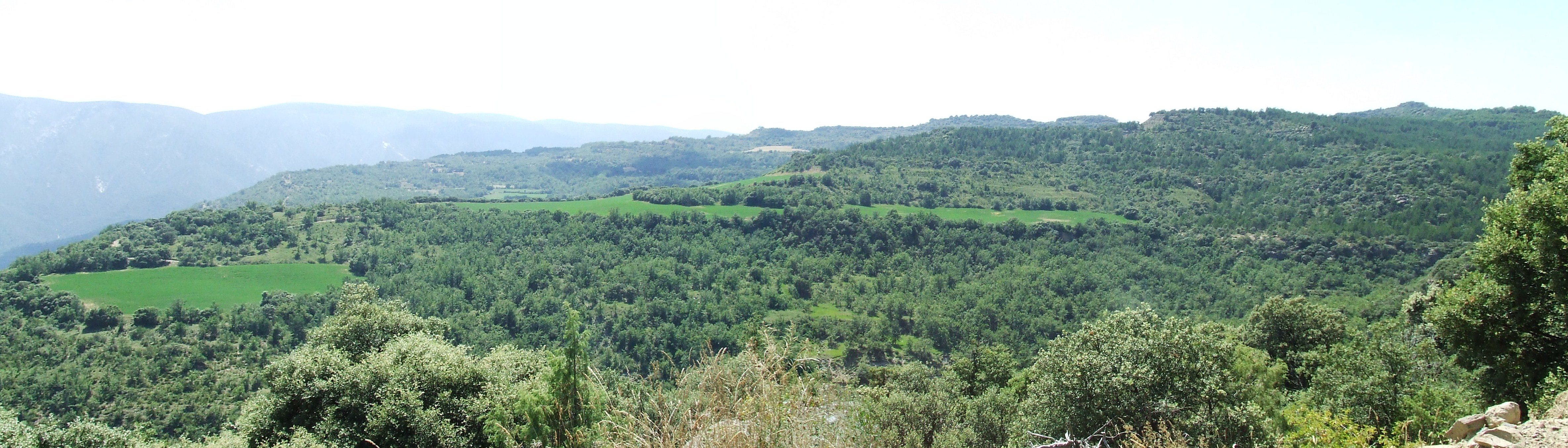 Extrem oriental de la Serra de Carboner (Mur, Castell de Mur, Pallars Jussà)